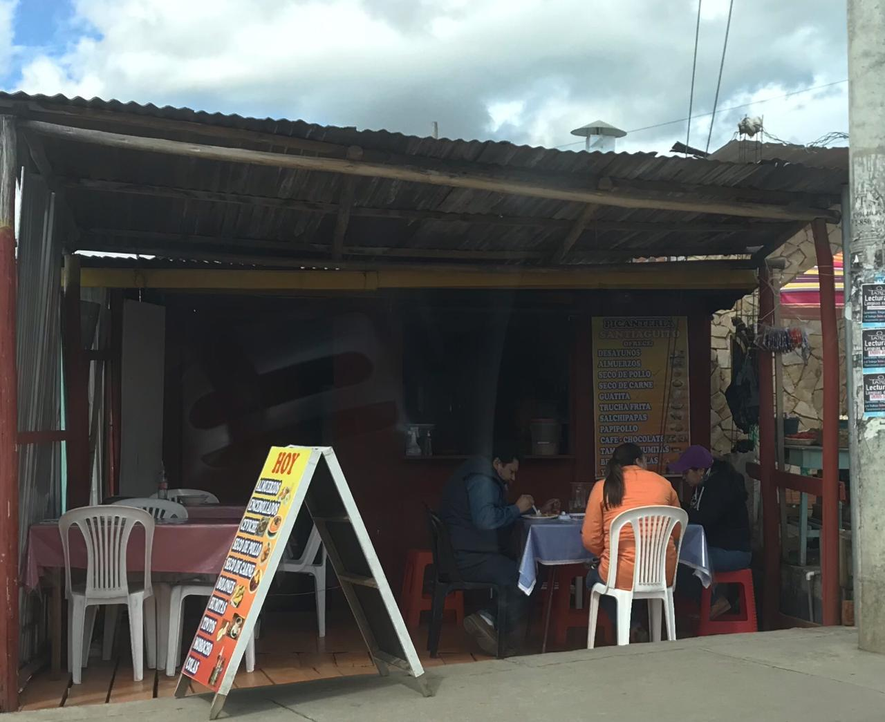 Picantería en San Joaquín, Cuenca- Ecuador